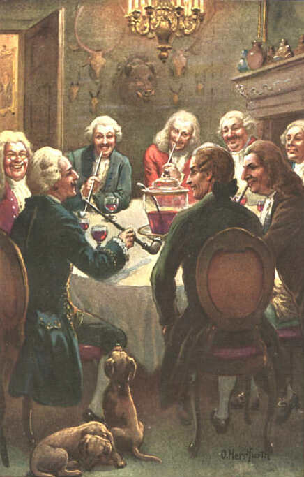 Münchhausens Abenteuer. Postkartenserie nach den Lügengeschichten des Baron Münchhausen. Serie der Firma UVACHROM (Verlag Farbenphotographische Gesellschaft m.b.H., Stuttgart) in zwei Folgen von je sechs Postkarten. Folge I: Serie 324. Nr. 4912–4917. Folge II: Unknown Text der Rückseite: Freiherr Hieronymus von Münchhausen stammte aus dem Hannoverischen und lebte von 1720-1792. Er war viele Jahre als Offizier in Rußland und kämpfte in zwei Kriegen gegen die Türken. Er war als ein Mann von Witz und Humor bekannt und galt als Erzähler unglaublicher Kriegs-, Jagd- und Reiseabenteuer. Bei einer Flasche guten Weines gab er gerne im Kreis seiner Freunde seine wunderbaren Reisen und Abenteuer zum Besten, die überall noch heute mit Vergnügen gelesen werden.